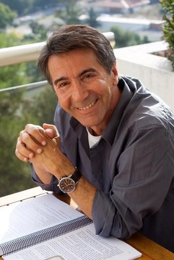 Lorenzo de´Medici